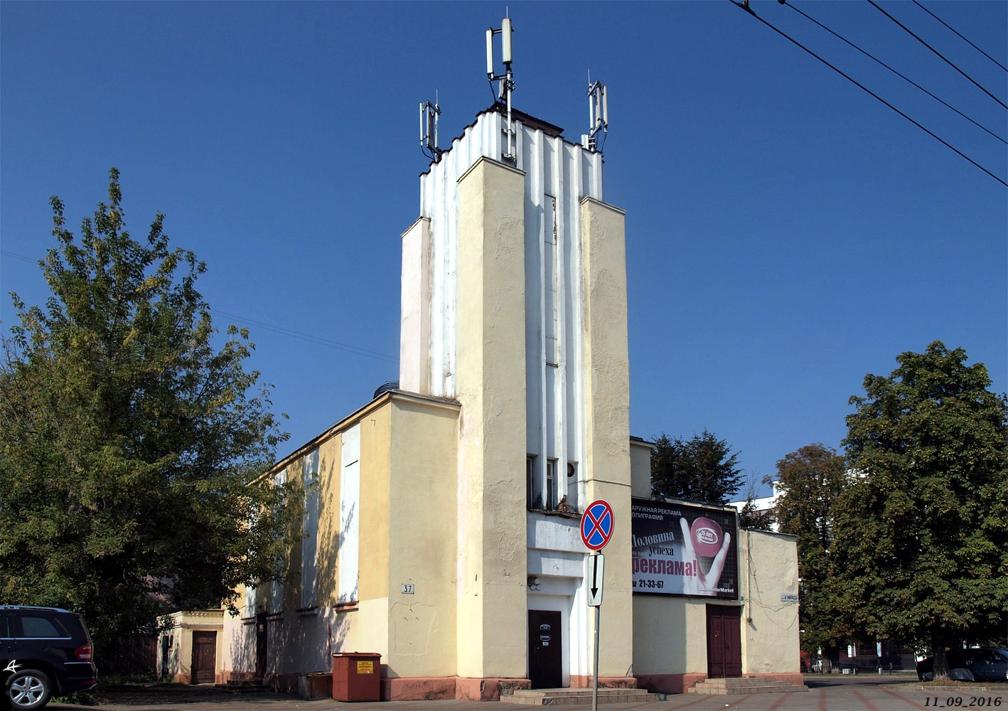 Брэст. Касцёл Святога Антонія Падуанскага. Вуліца Карла Маркса, 56